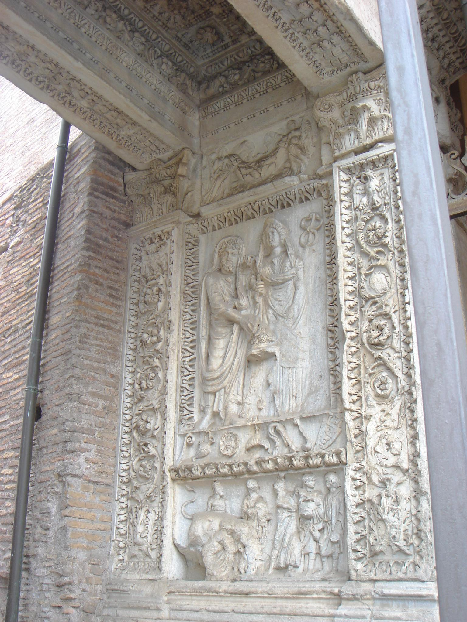 Bogen der Geldwechsler bei der Kirche San Giorgio in Velabro, Rom. Soffitte. Im großen Panel sind dargestellt (v.l.nr.): Kaiser Septimius Severus, seine Frau Julia Domna und ursprünglich deren Sohn Geta. Letzterer wurde nachdem ihn sein Bruder Kaiser Caracalla ermorden ließ von der Darstellung entfernt.